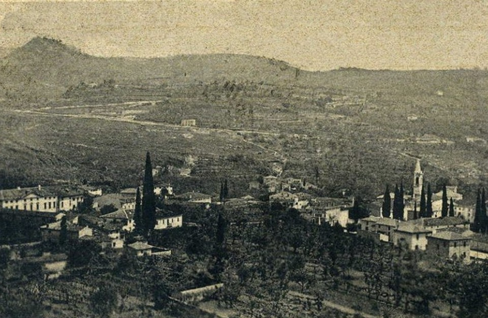 Fumene (provincia di Verona) in una fotografia dei primi del XX